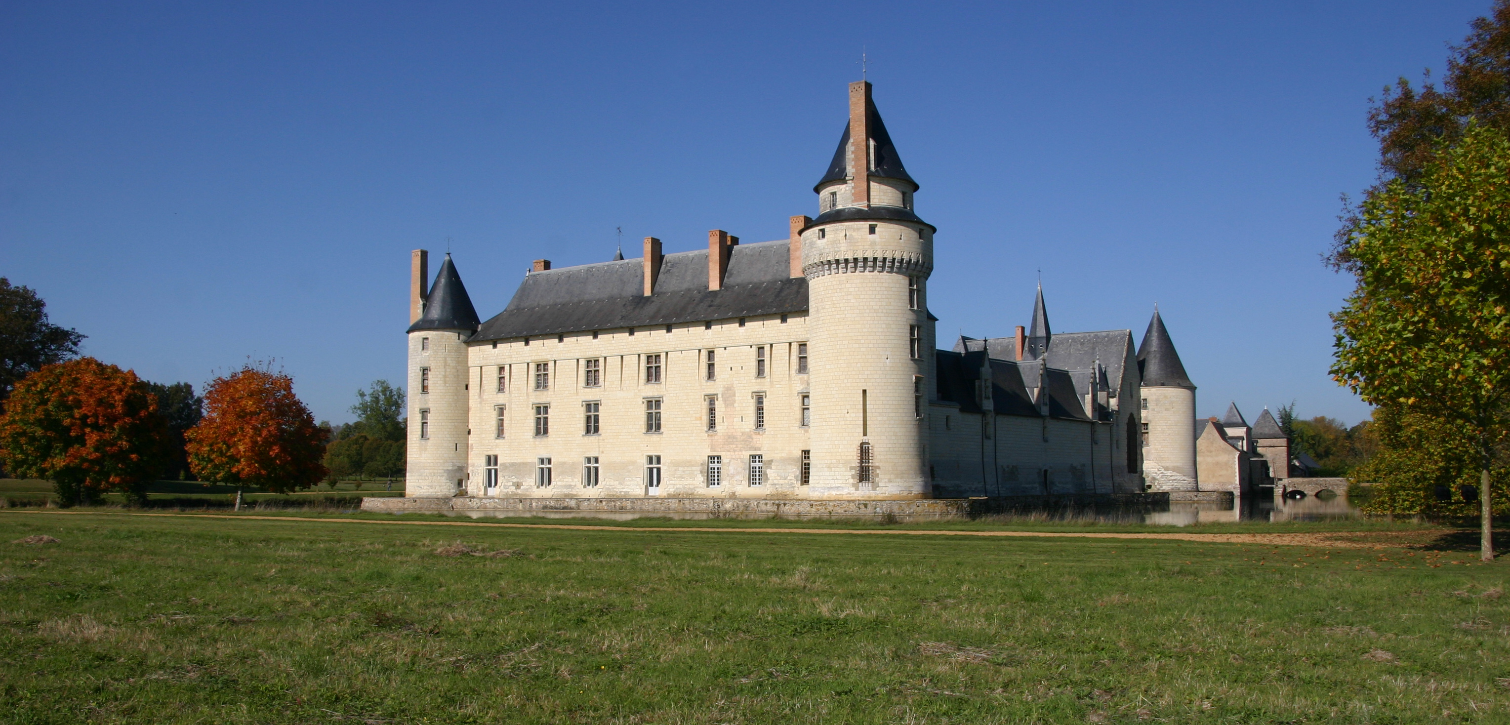 Schloss Plessis-Bourré